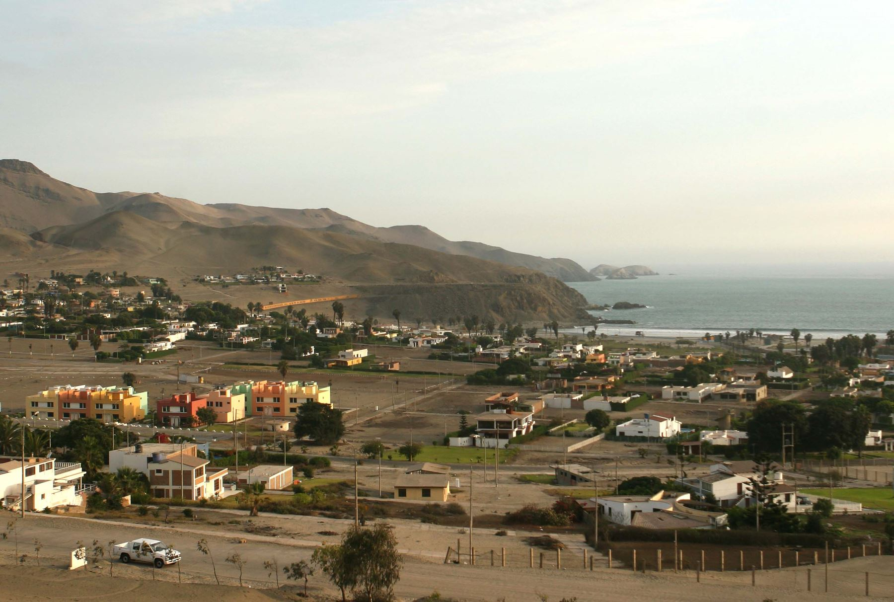 Centro urbano, financiero y político del distrito de Santa Rosa en Lima.